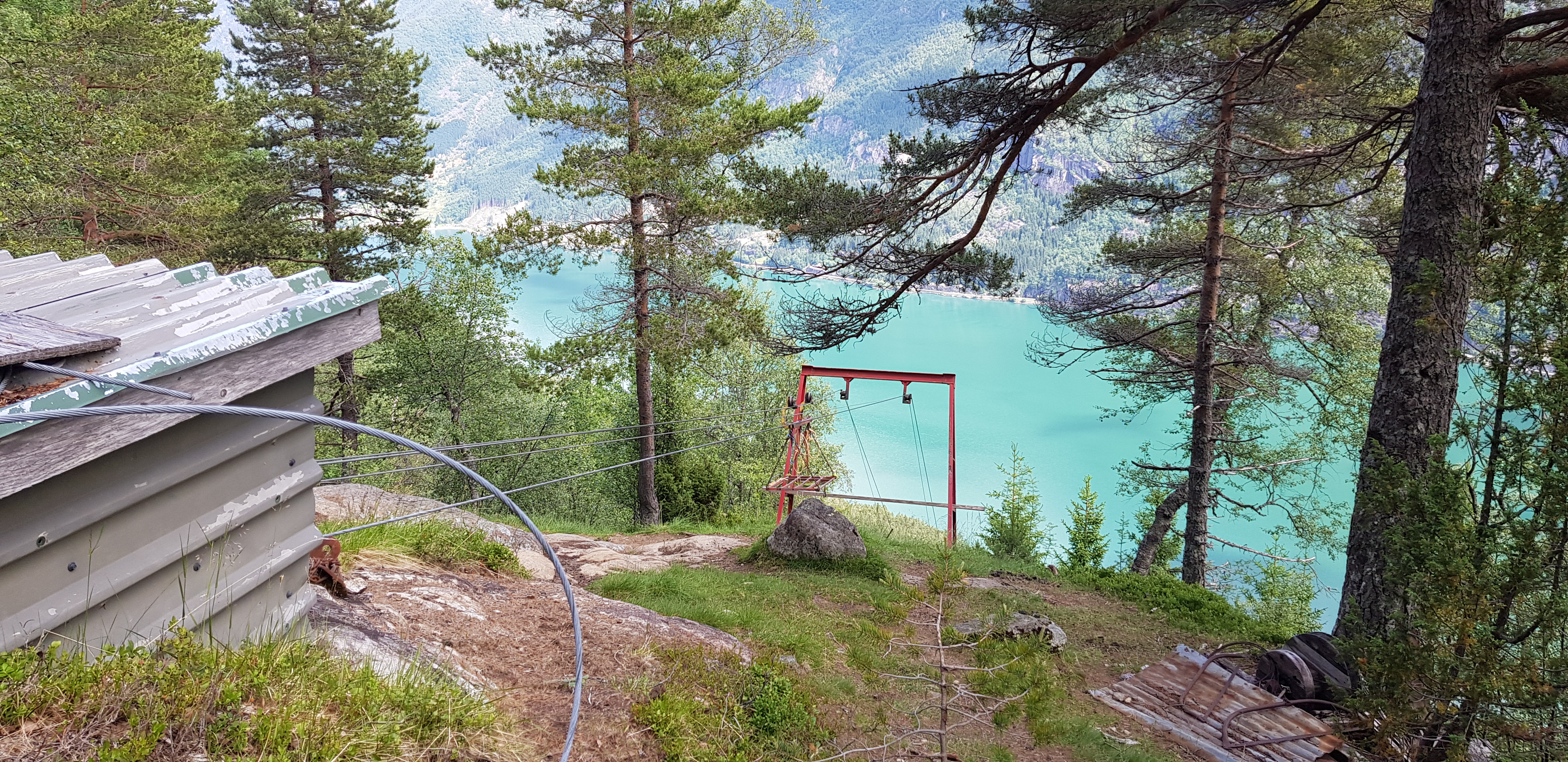 Løpestreng i bruk